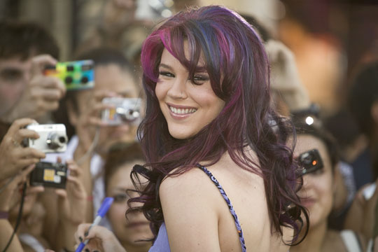 MMVAs